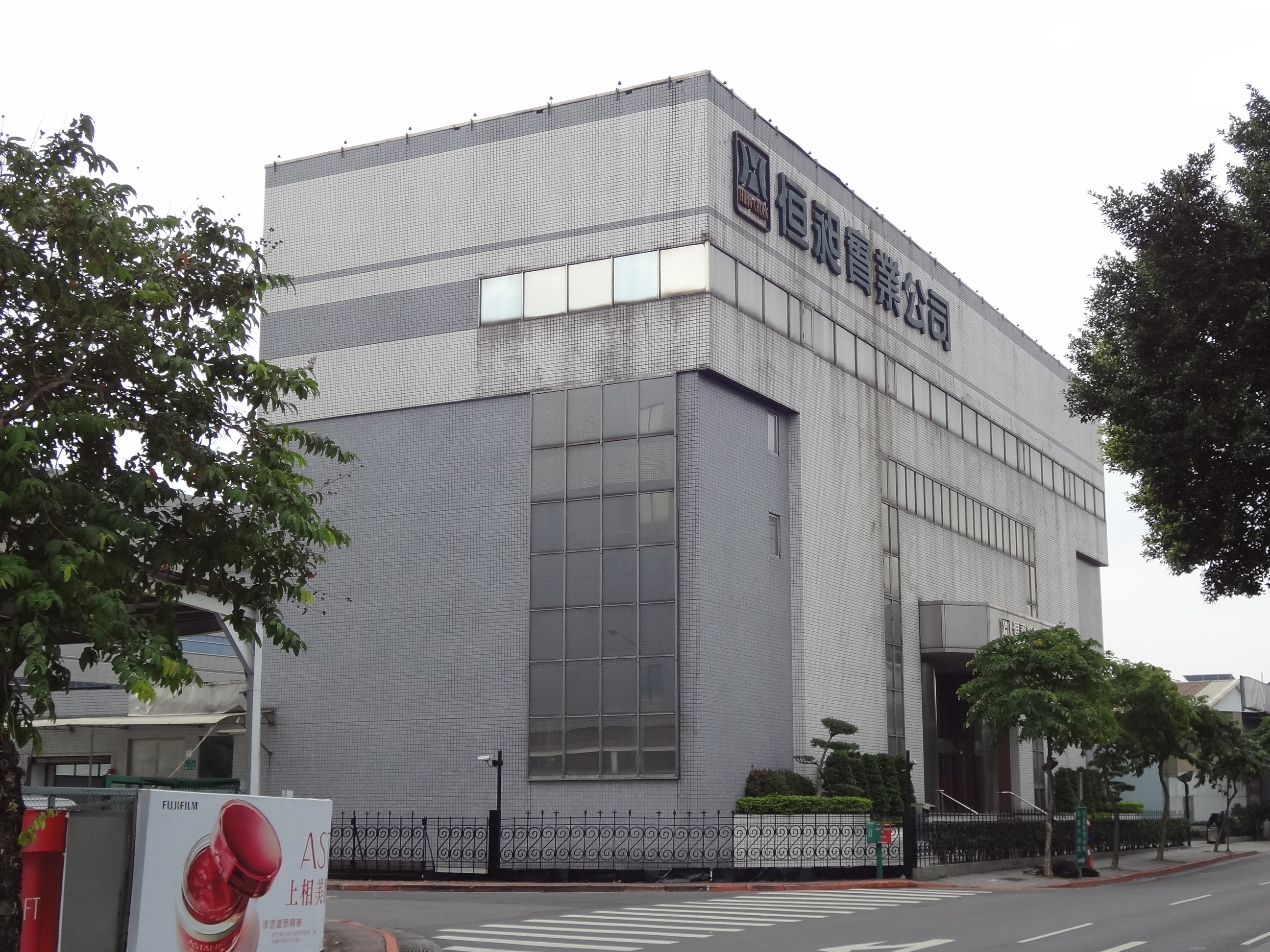 恆昶實業總部，位於臺北市內湖區民權東路六段38號